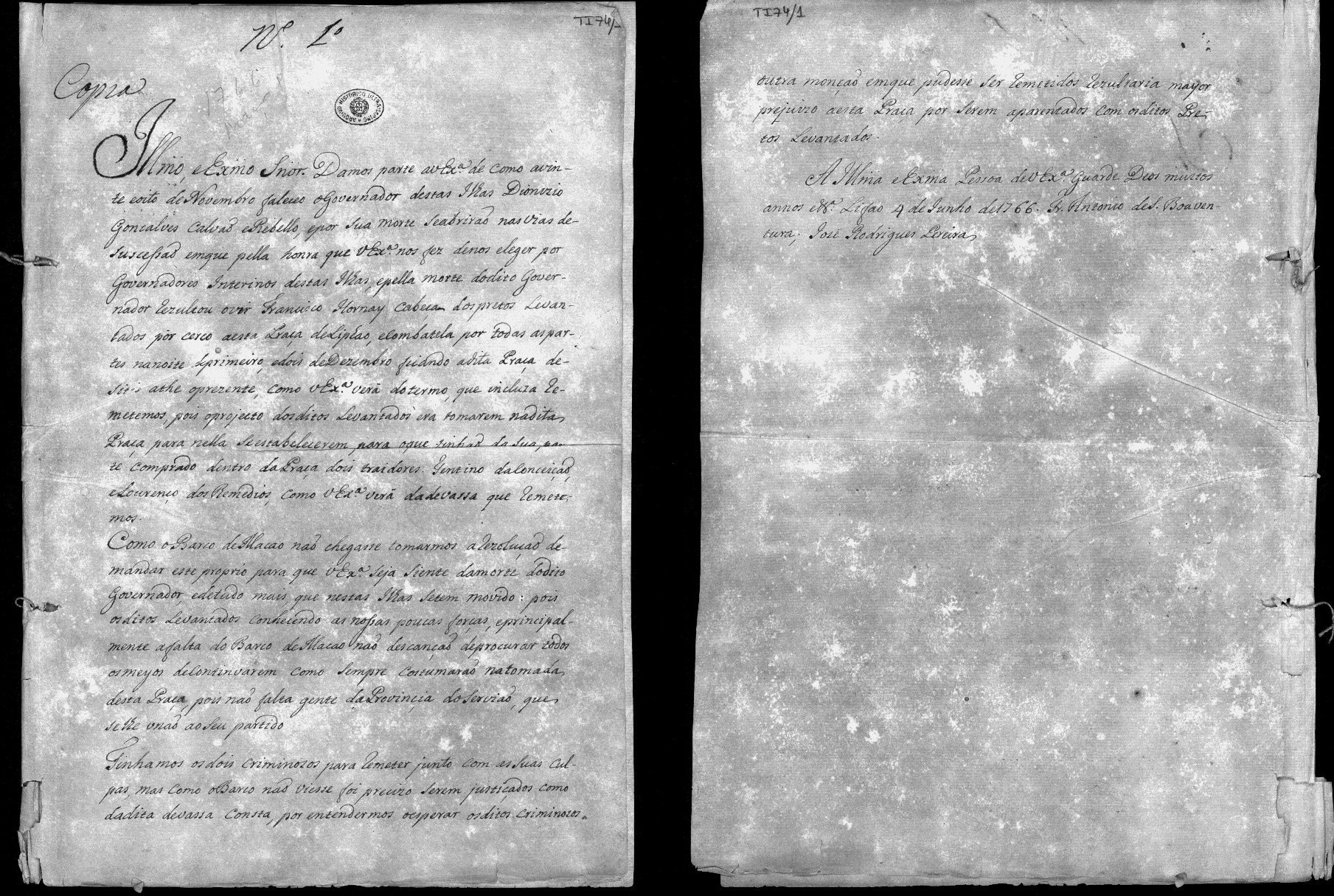 CARTA do Conselho do Governo do estado da Índia ao rei [D. José] sobre a morte do governador e capitão-geral das ilhas de Timor e Solor, Dionísio Gonçalves Galvão Rebelo e dificuladdes em que ficaram as mesmas ilhas. Resolução dos governadores interinos frei António de São Boaventura e José Rodrigues Pereira de não admitirem Francisco Hornay na via de sucessão. Insucesso do envio de socorros a Timor pelo navio SantaCatarina. Nomeação de capitão-mor da fortaleza da Aguada para goverandordas ilhas de Timor e Solor e recomendação ao governador e Senado de Macau para continuarem a enviar navio a Timor anualmente.